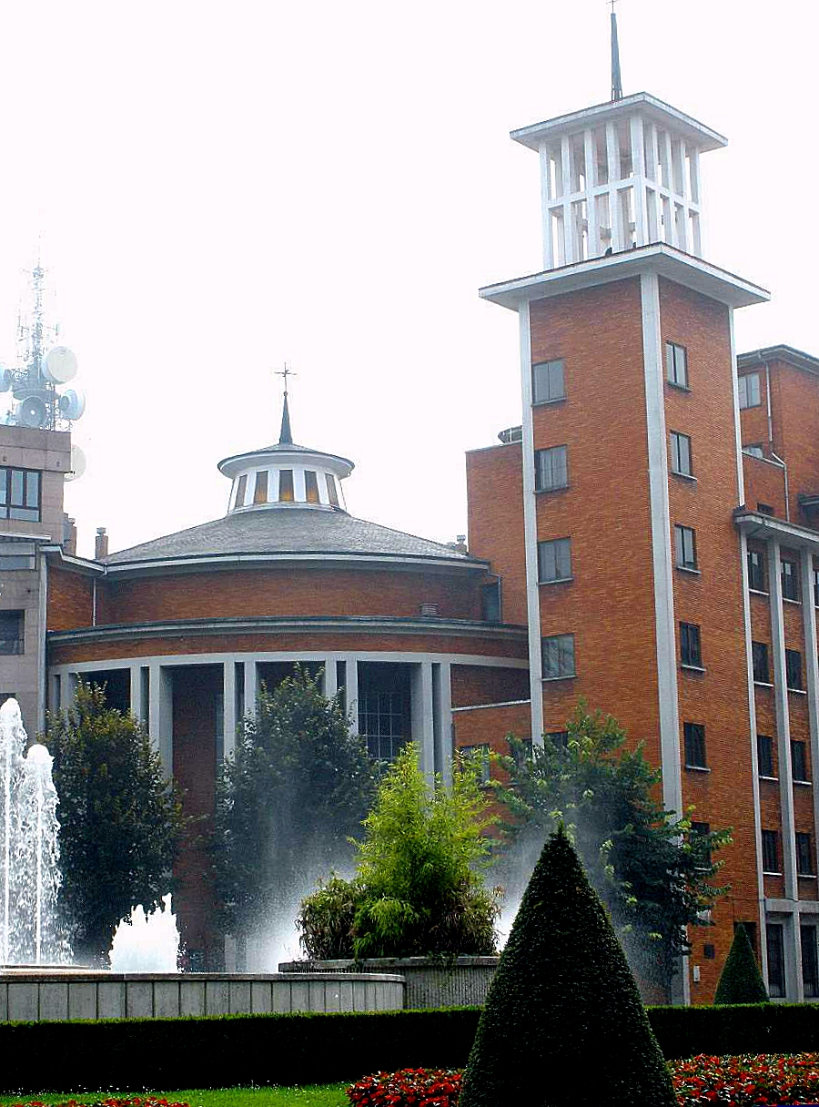 Iglesia del Inmaculado Corazón de María, en Oviedo